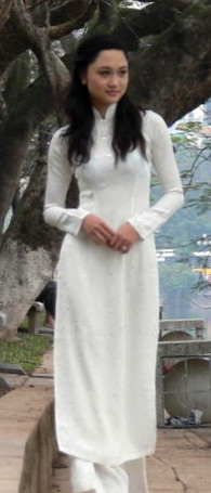 A young woman in áo dài by Hồ Gươm, Hanoi, Vietnam.